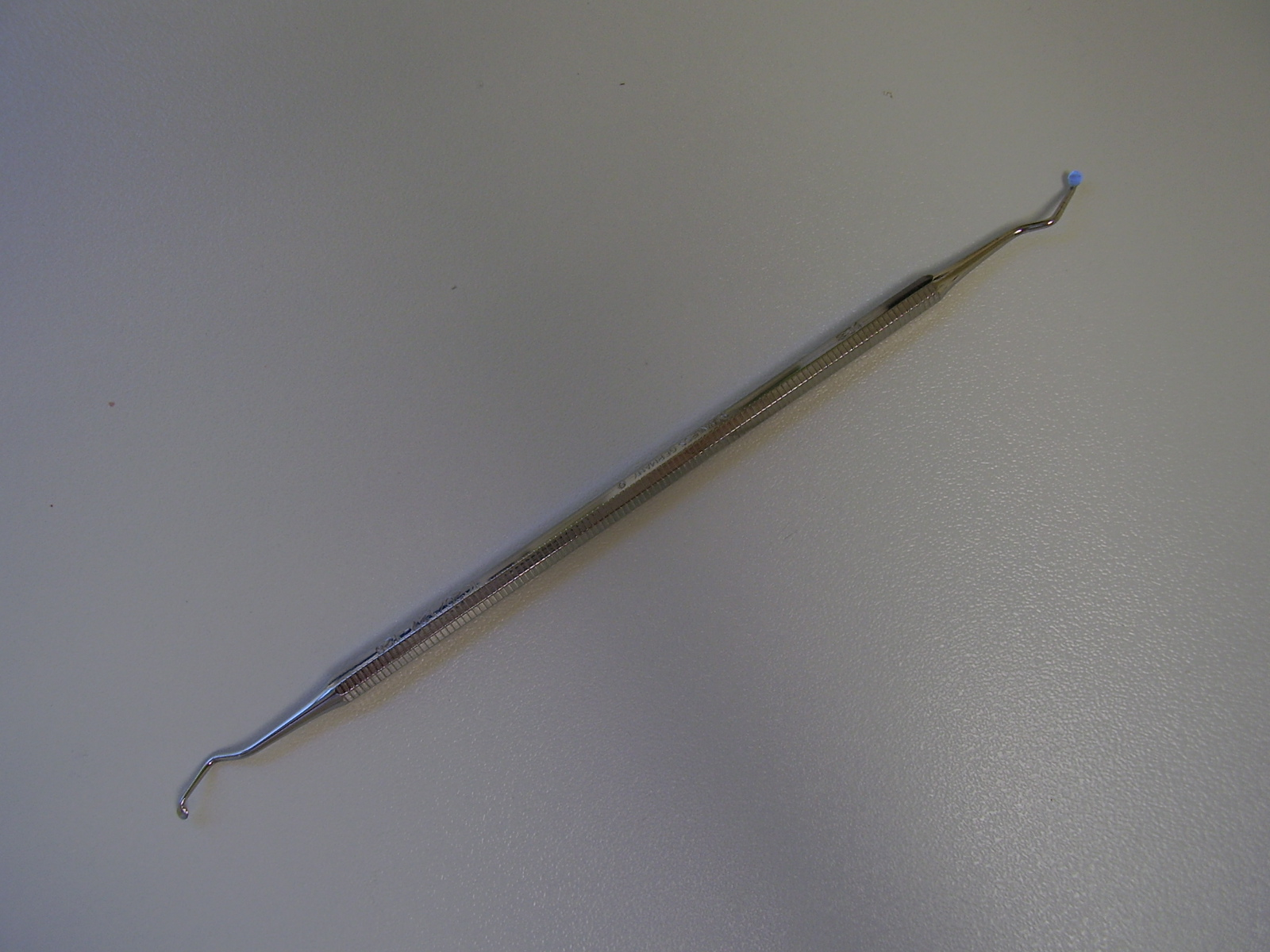 Excavator